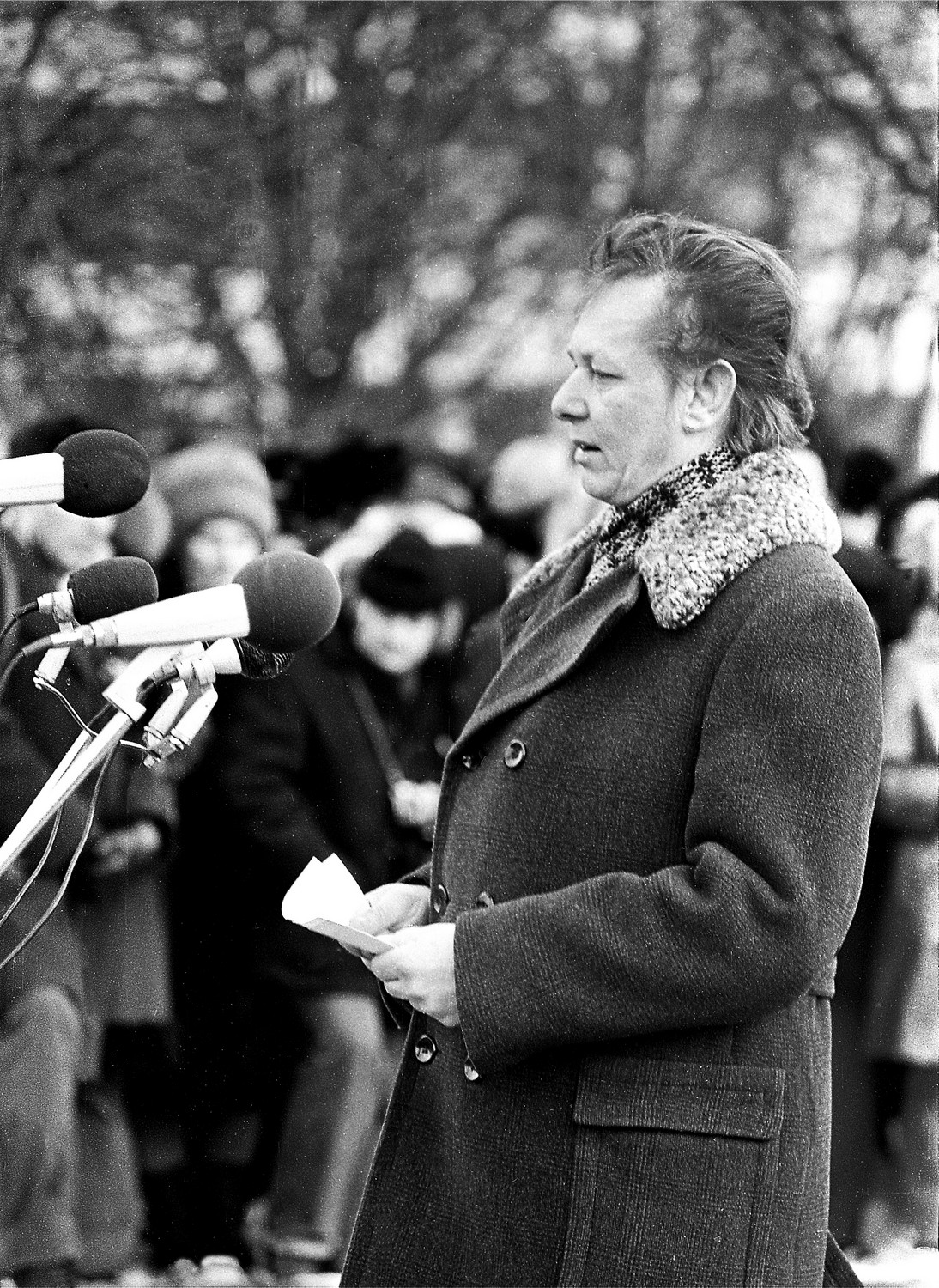 A. H. Tammsaare monumendi avamine 78 (17) Enn Vetemaa